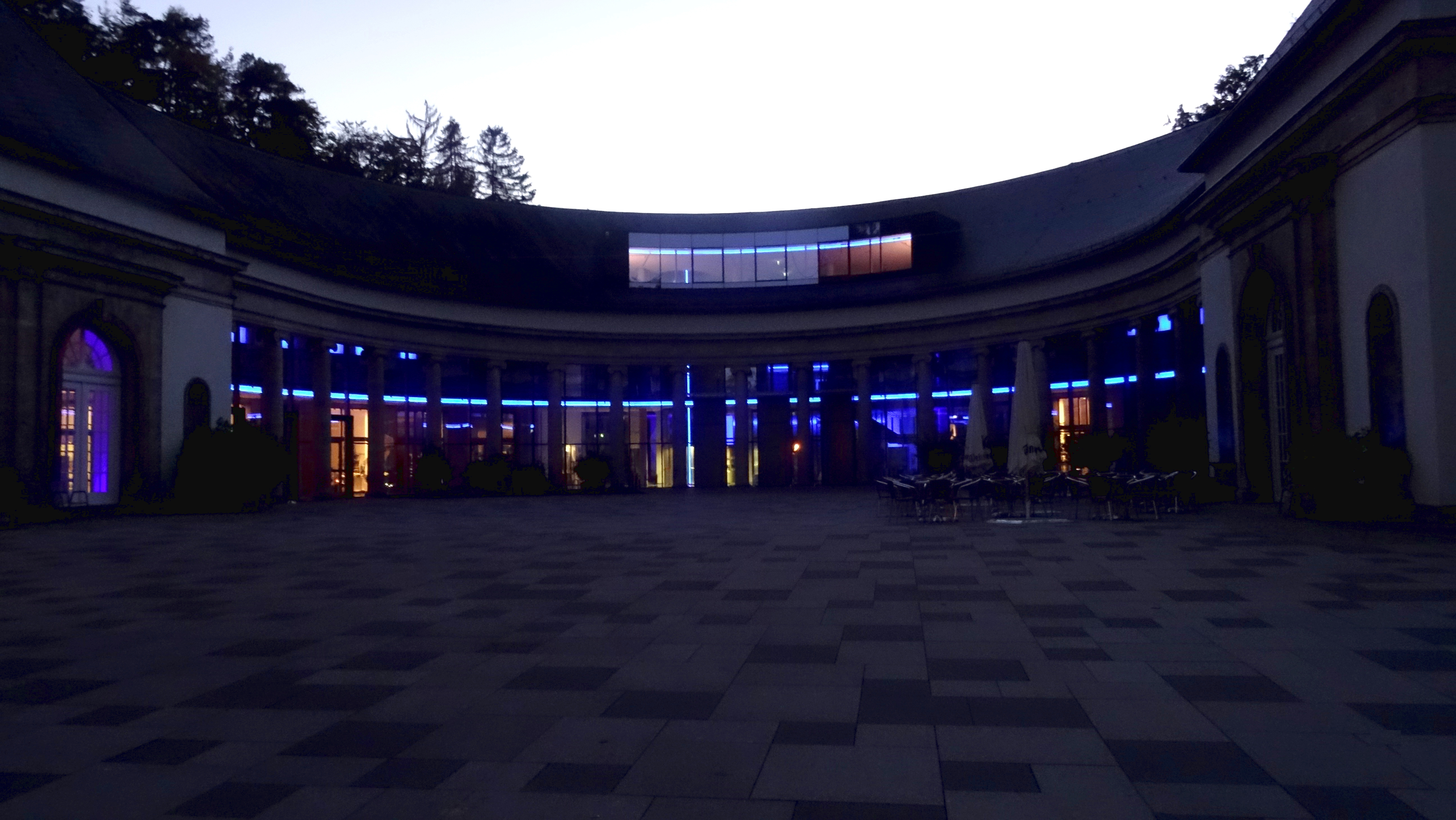 Wandelhalle im Kurpark